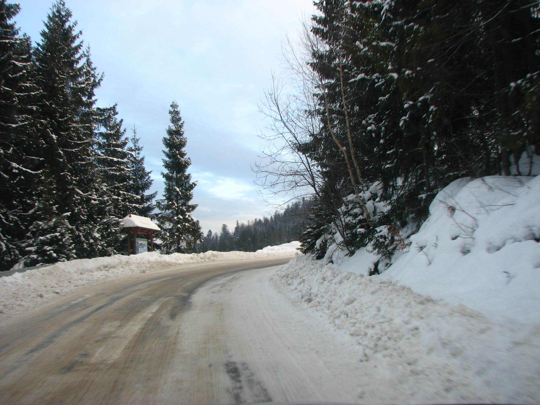 Jedna z tablic informacyjnych przy Drodze Knurowskiej.